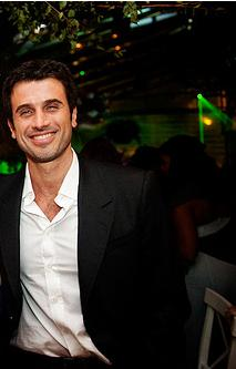 c_daniela_giuliano_1643.jpg